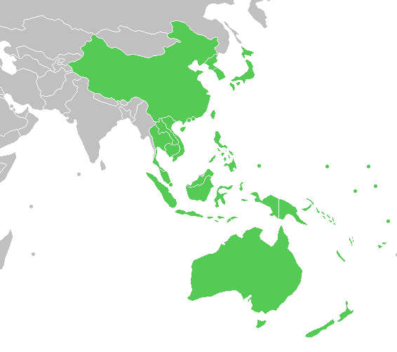 Map representin' the Asia Pacific zone made up on one of the Wikipedia maps of the world File:BlankMap-World-v2.png. The map was made by User:Vardion, adapted formerly by Pluribus Anthony and now by User:Mariotto2009 for Wikipedia.